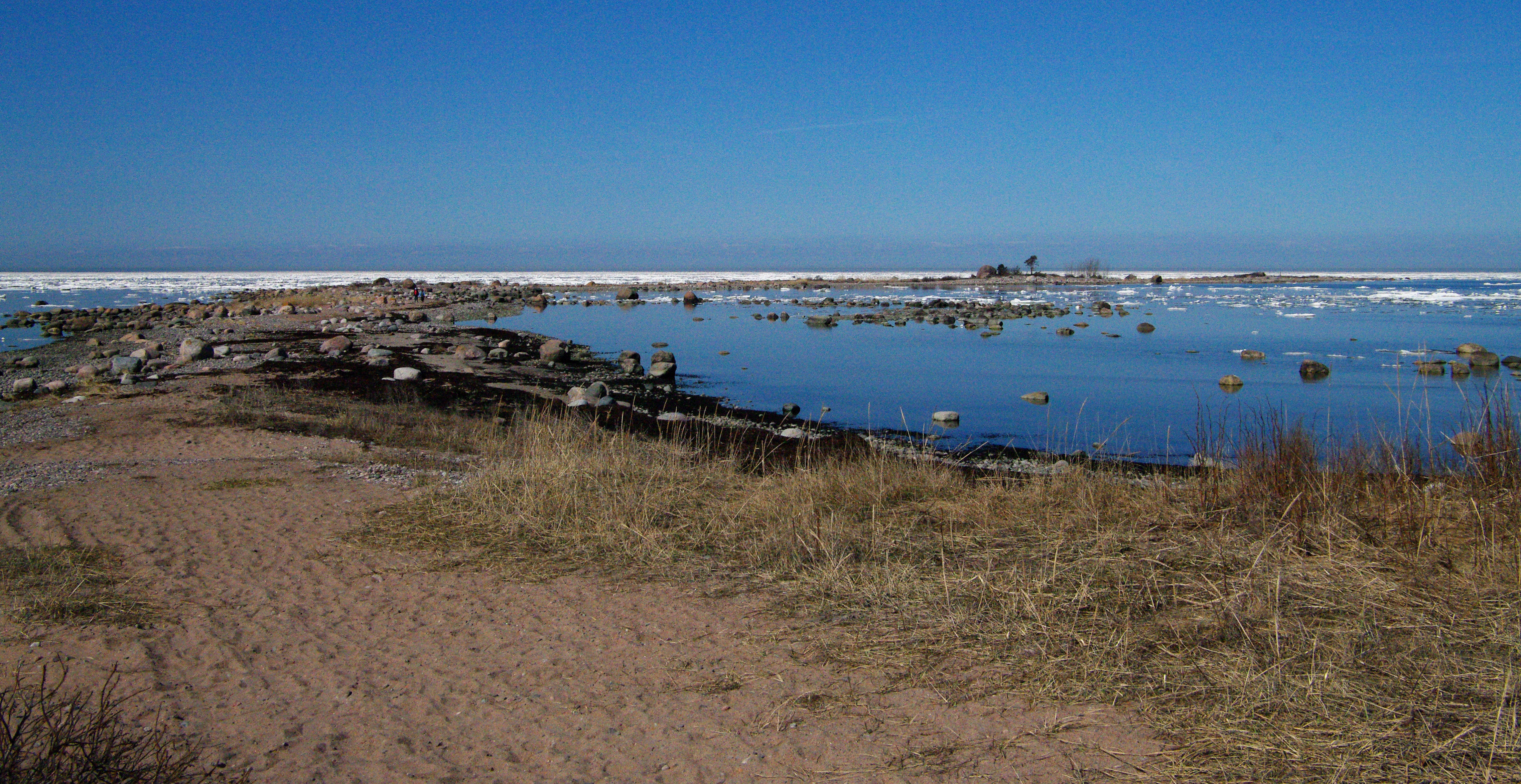 Purekkari neem